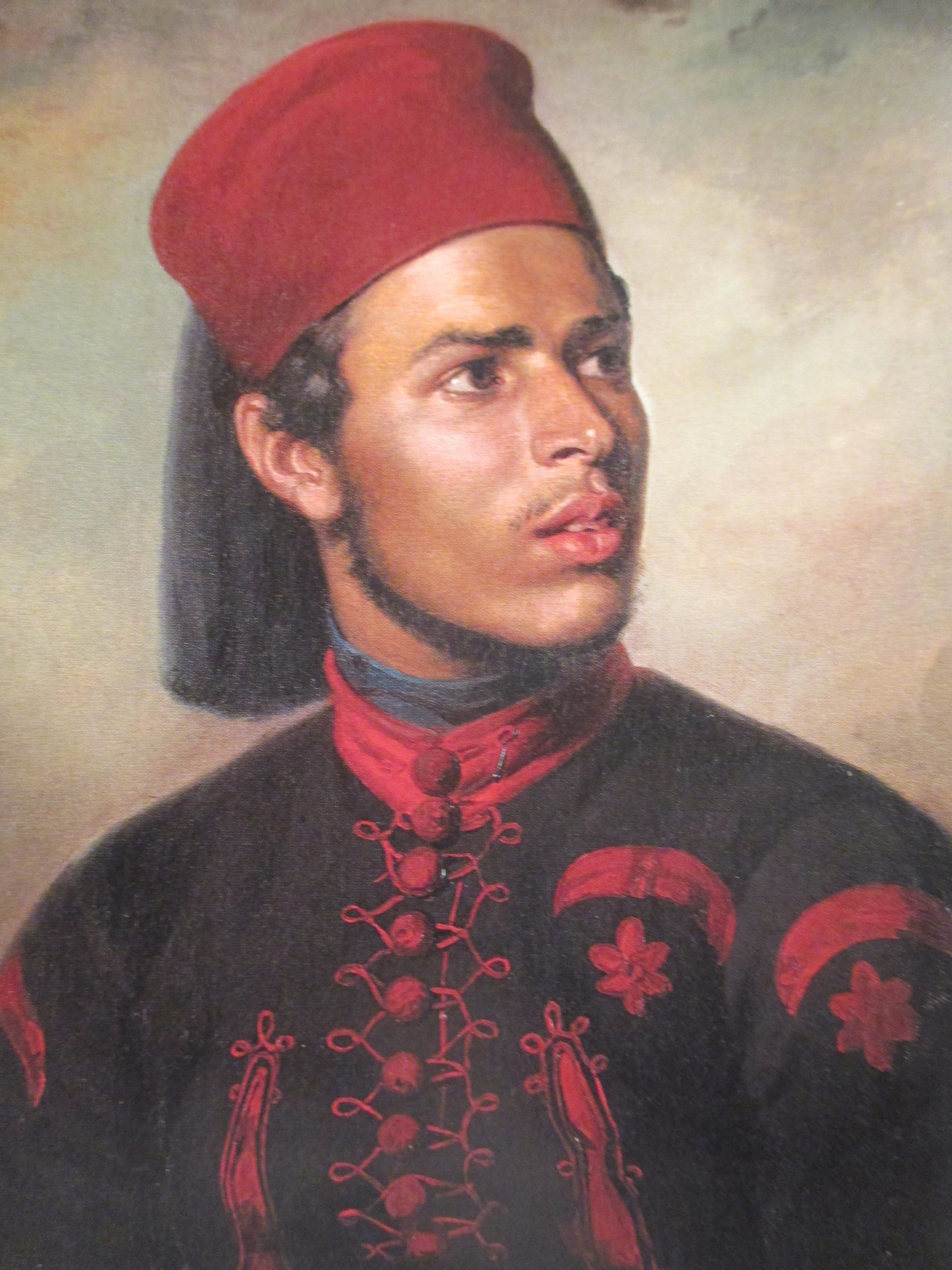 Hermann Ernecke (Berlin 1817 - 1894), Portrait de jeune homme au chéchia, huile sur toile, 60 X 47,4. Vente Sotheby's 2004.